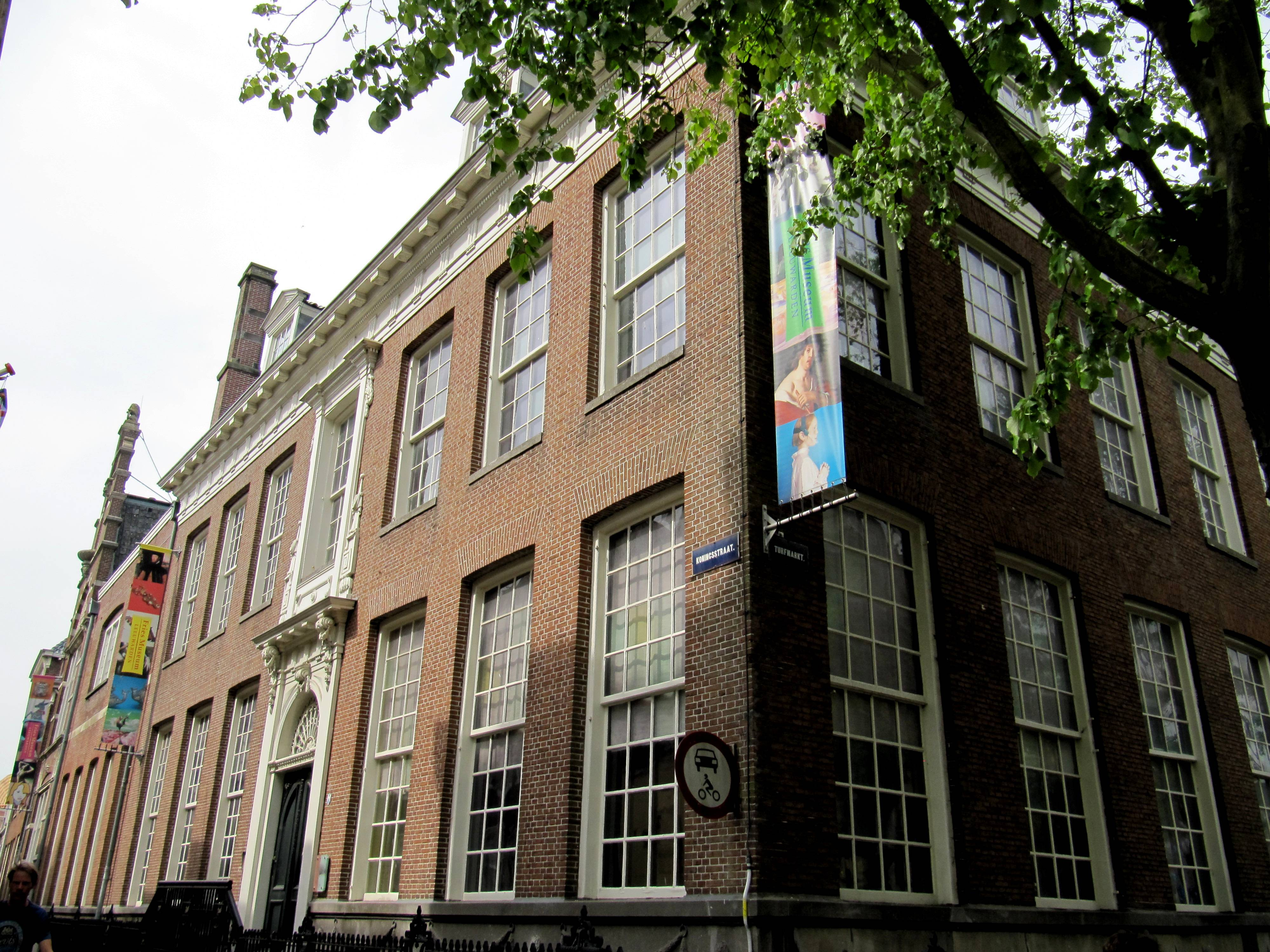 Fries museum. Statig, gaaf bewaard hoekpand in 1781 voor Fr. van Eysinga gebouwd; in 1806 vergroot. Omlijste deurpartij, roeden in de vensters, geblokte kroonlijst, schoorstenen met borden.